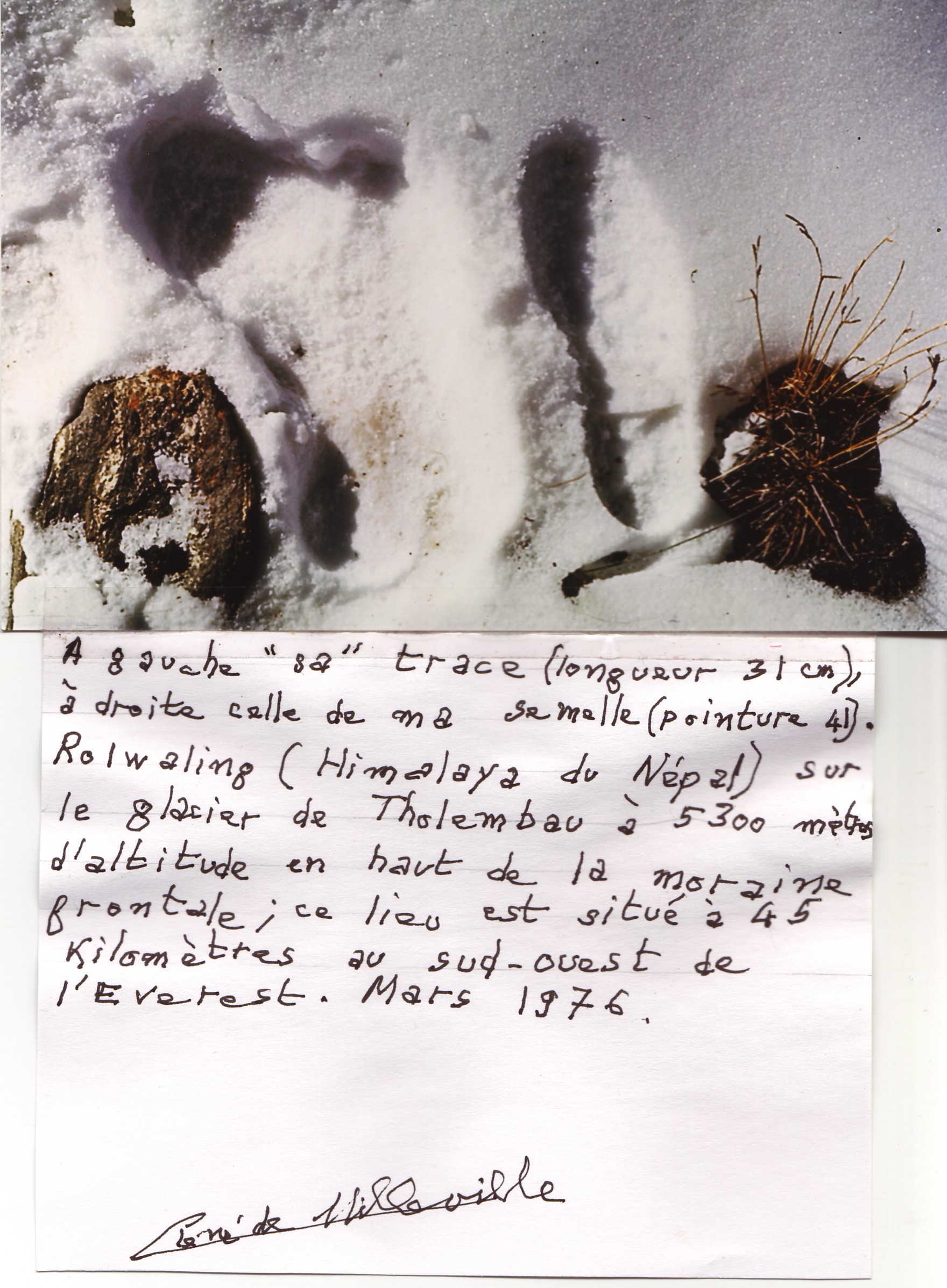 René de Milleville - "Sa" trace de pas (yeti?) à coté de la trace de pas de René de Milleville. note: The description (in French) mentions Rolwaling Himal